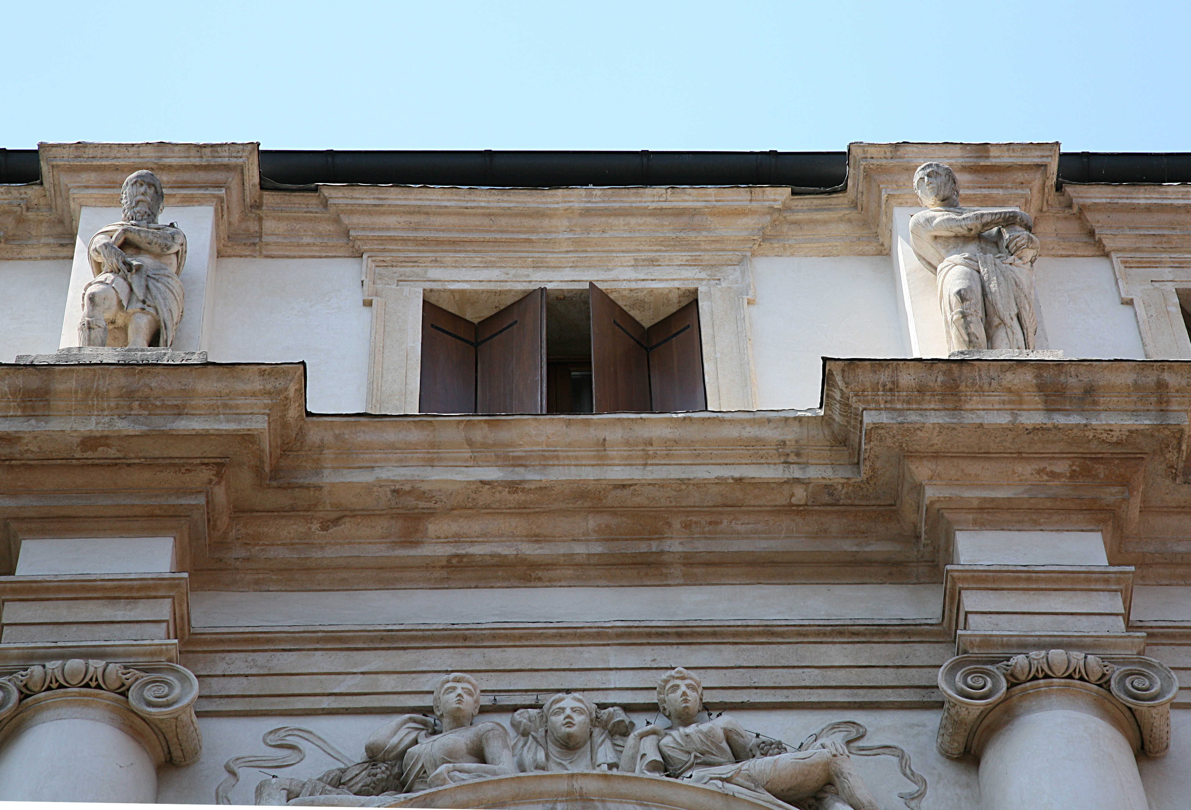 Palazzo Porto in Vicenza